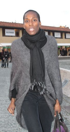 Fiona May Iapichino (Slough, 12 dicembre 1969) è una ex atleta e attrice italiana di origine britannica.